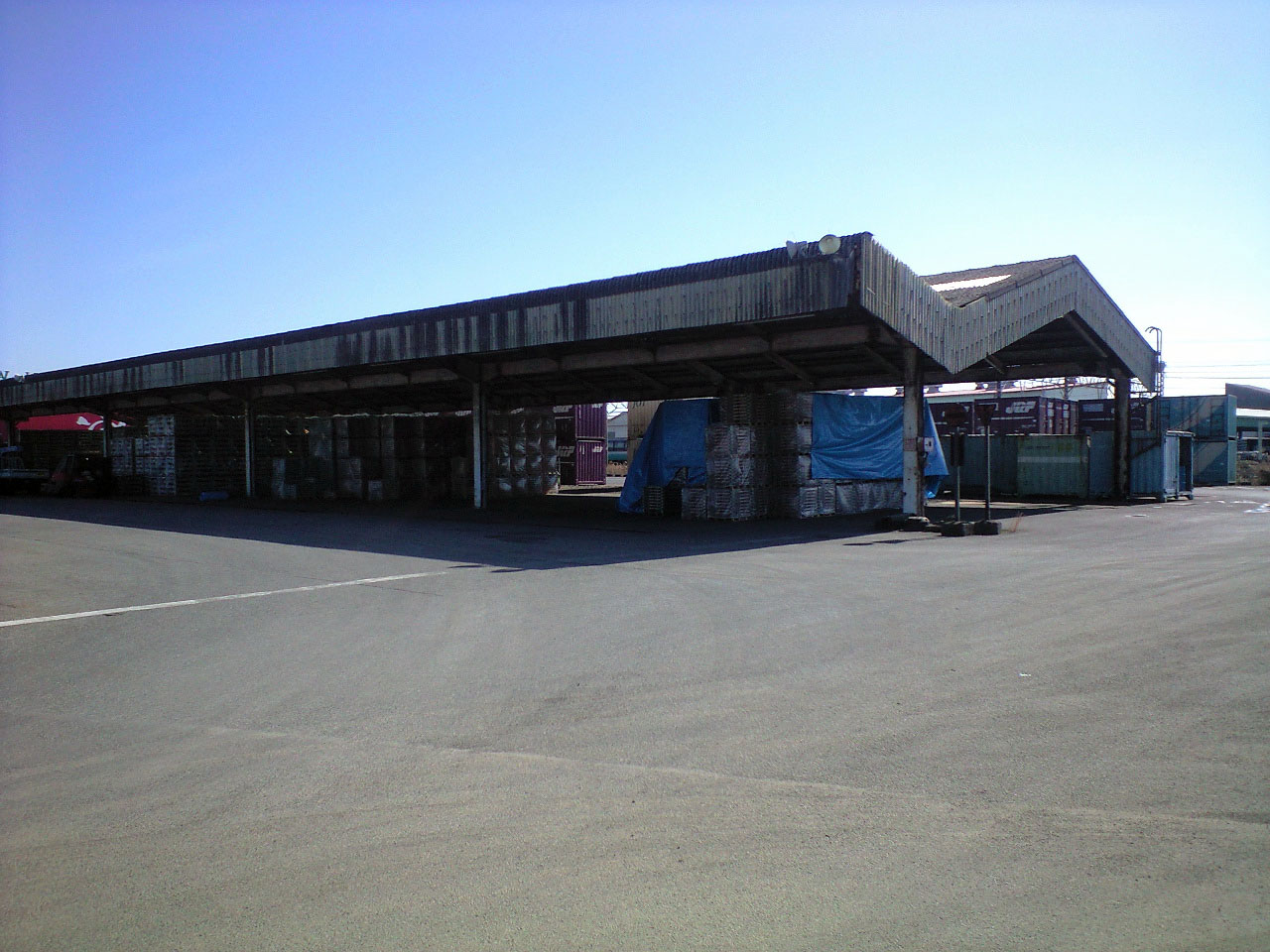 神奈川県小田原市前川、JR貨物西湘貨物駅（敷地外から撮影）